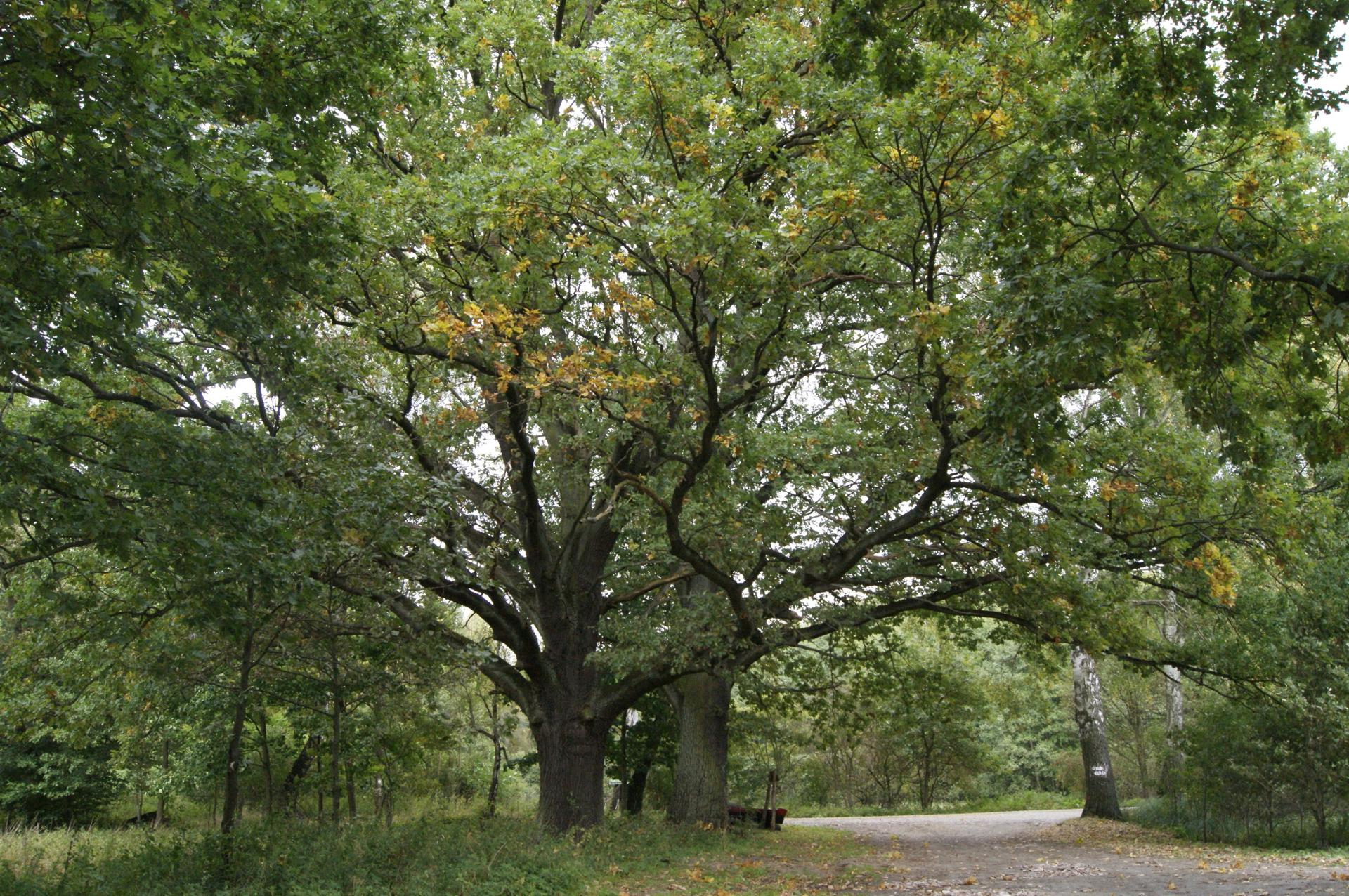 Pomnikowe dęby